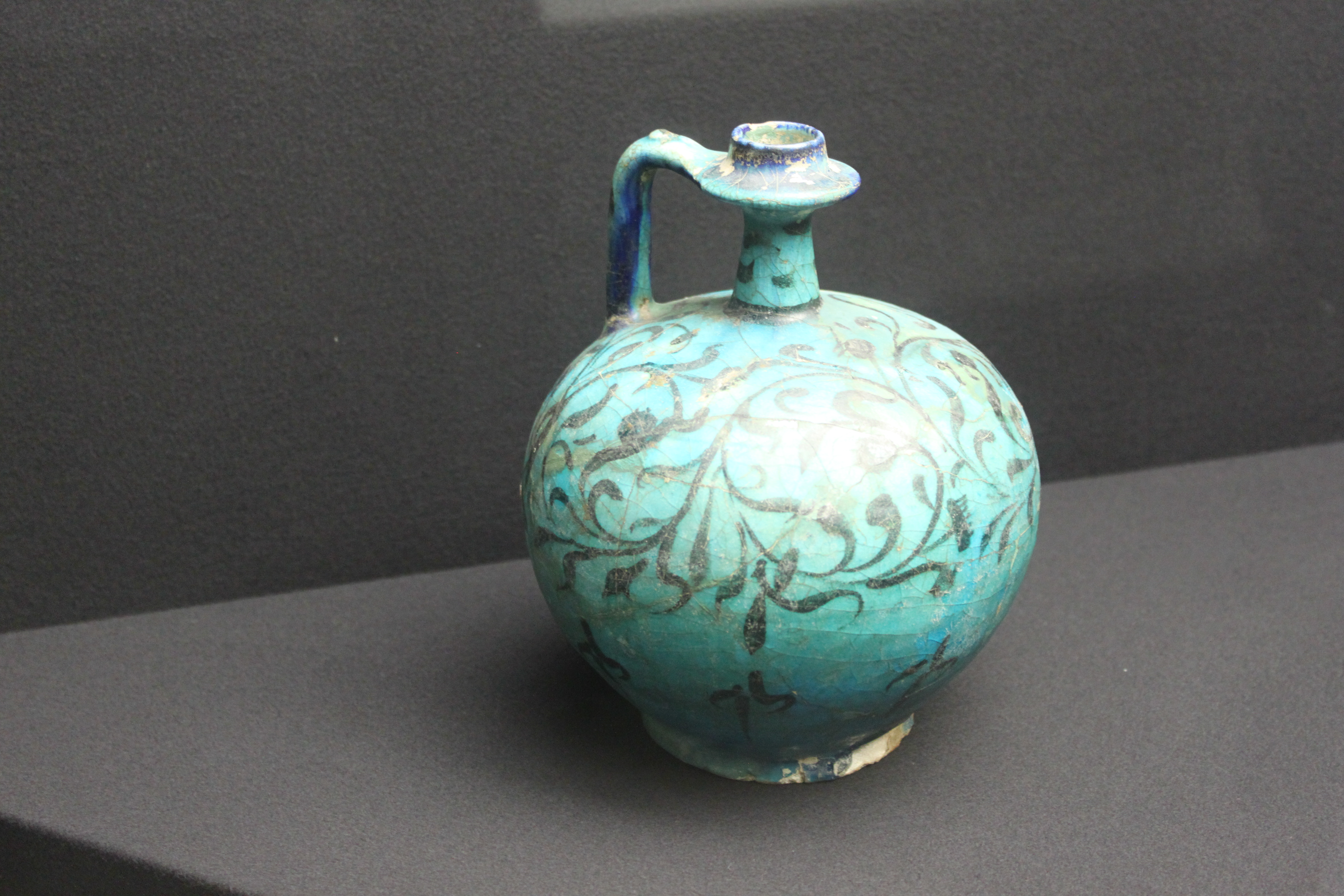 Pot Kashan Iran XIII pate siliceuse, noir et bleu sous glaçure turquoise. Motifs "waterweed".